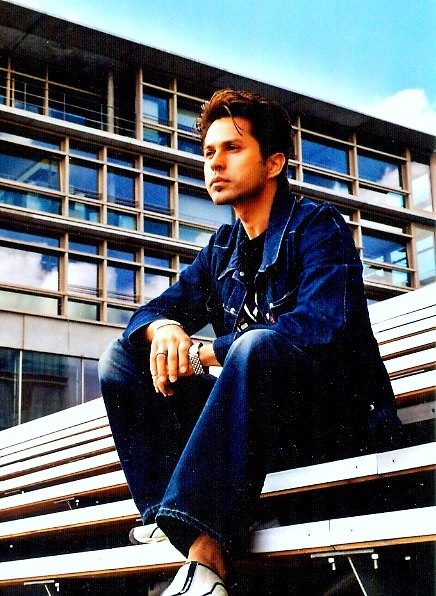 Photo